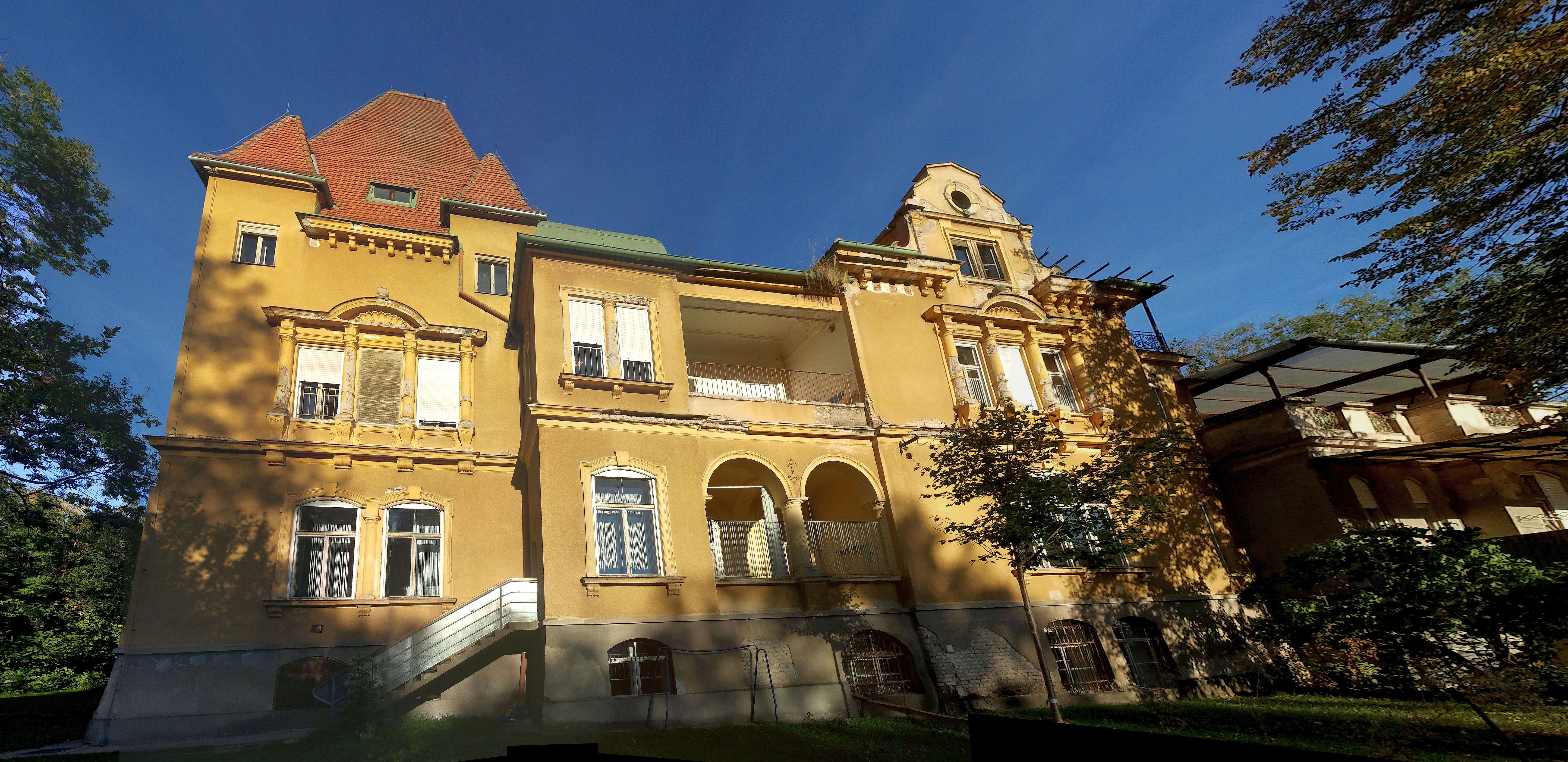 Ehem. Sanatorium Mariagrün/ Kinderkrippe Haus des Kindes (von Südosten), Schönbrunngasse 30, Graz, Österreich